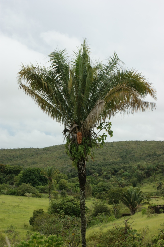 Attalea brasiliensis - ARECACEAE Edilândia - Goiás - Brasil.